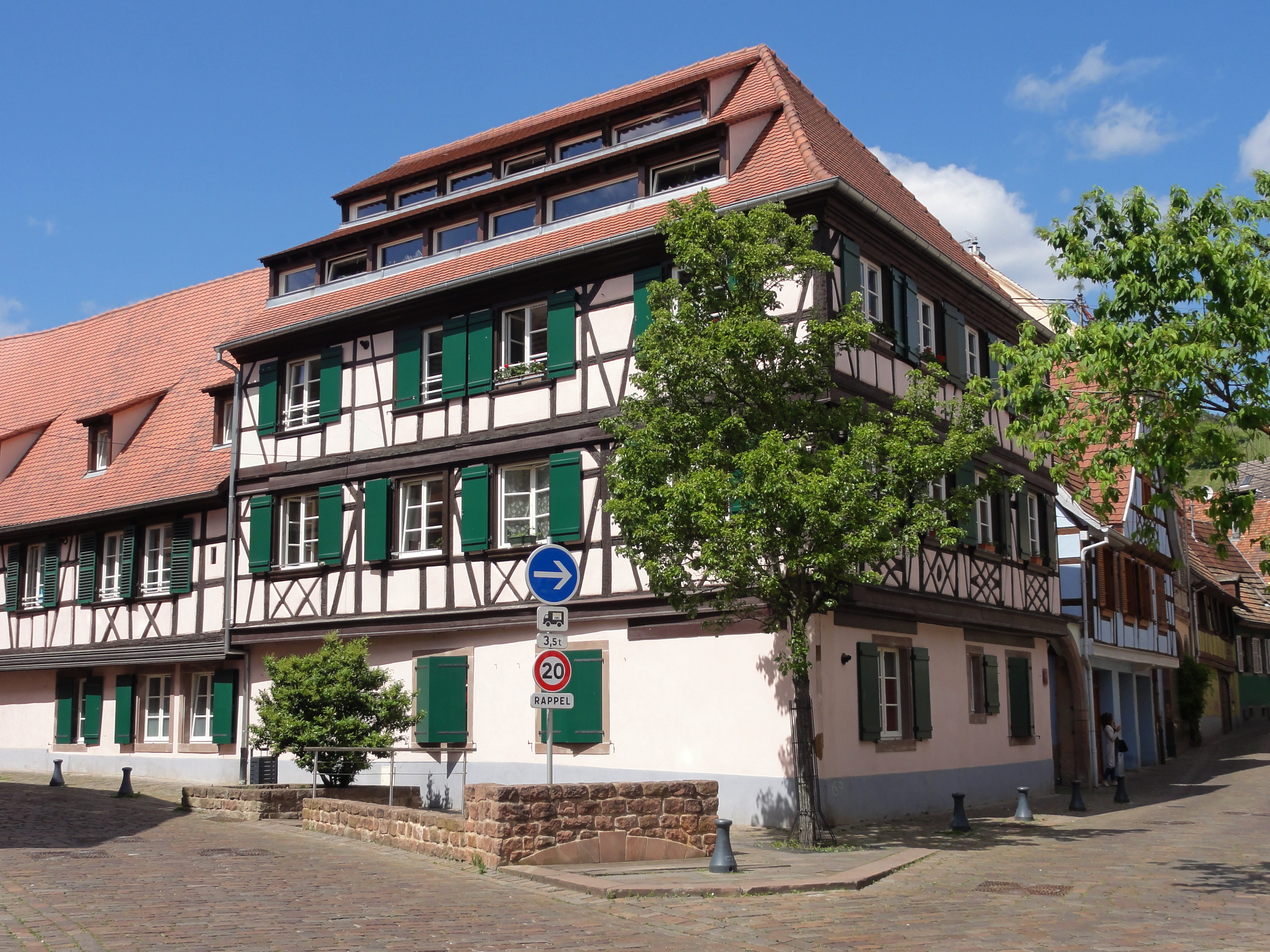 Alsace, Bas-Rhin, Barr, Maison de tanneur (XVIIe), 2 rue des Cigognes. .